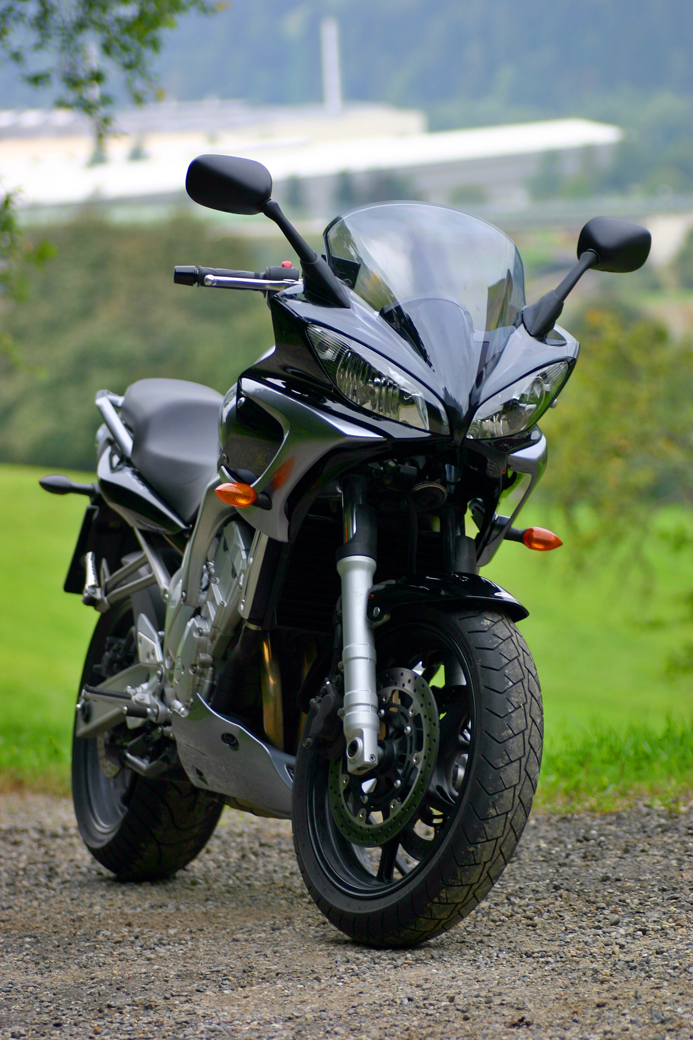 Yamaha FZ6 Fazer, Typ RJ07, Baujahr 2006. Das Motorrad ist mit Ausnahme des Bugspoilers, der nachträglich montiert wurde, im Originalzustand.